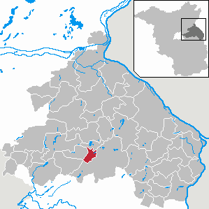 Waldsieversdorf in Brandenburg (Country) - District Märkisch-Oderland